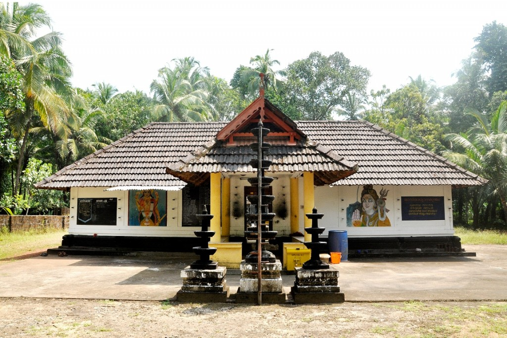 Sri Narayanathu Kavu Sudarsana Temple (Paverikkara P.O, Poyilasseri, Triprangode, Kerala)